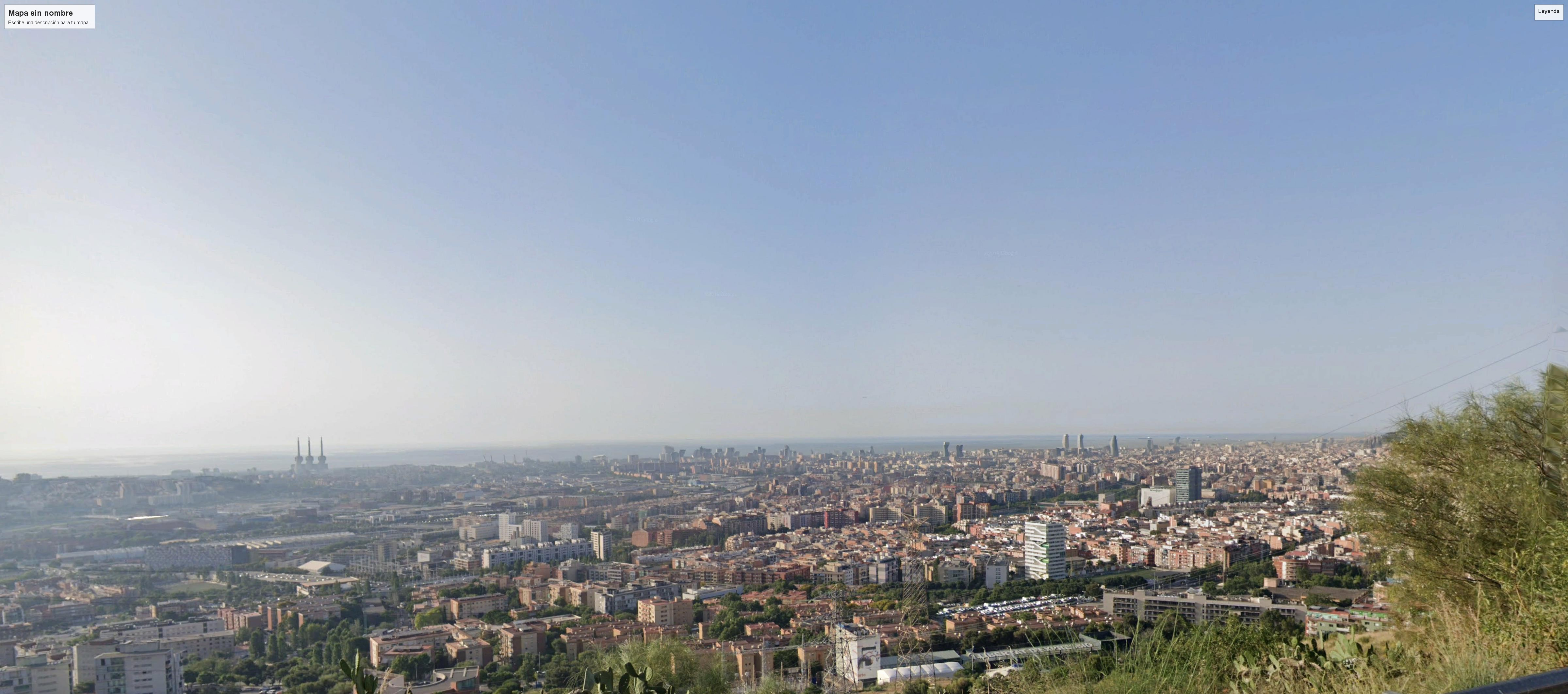 Nou Barris y vista general de Barcelona desde el mirador de Torre Baró, el barrio más pobre de Barcelona